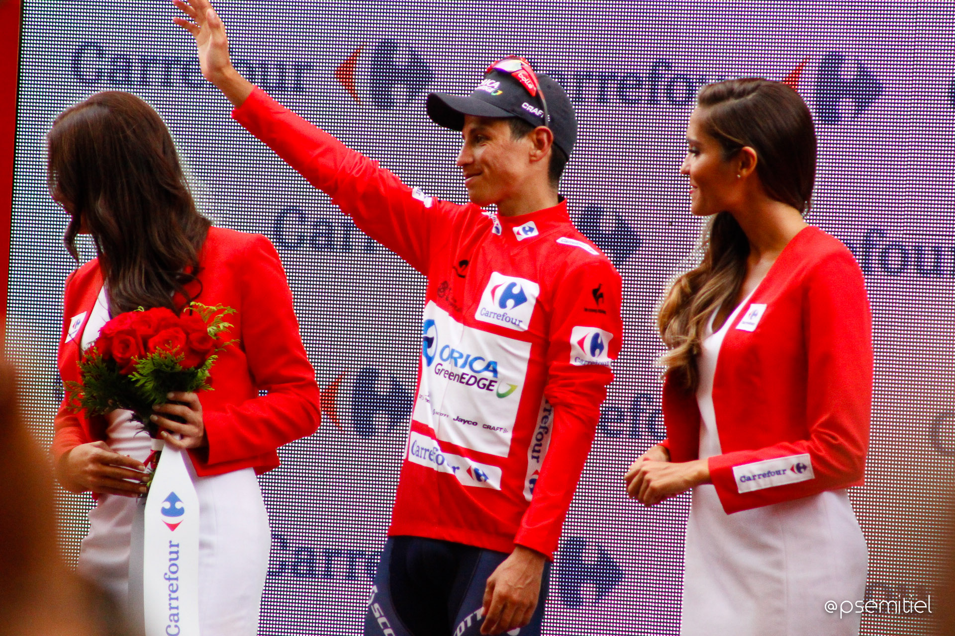 Vuelta a España 2015 | 8ª Etapa Puebla de Don Fadrique - Murcia-92